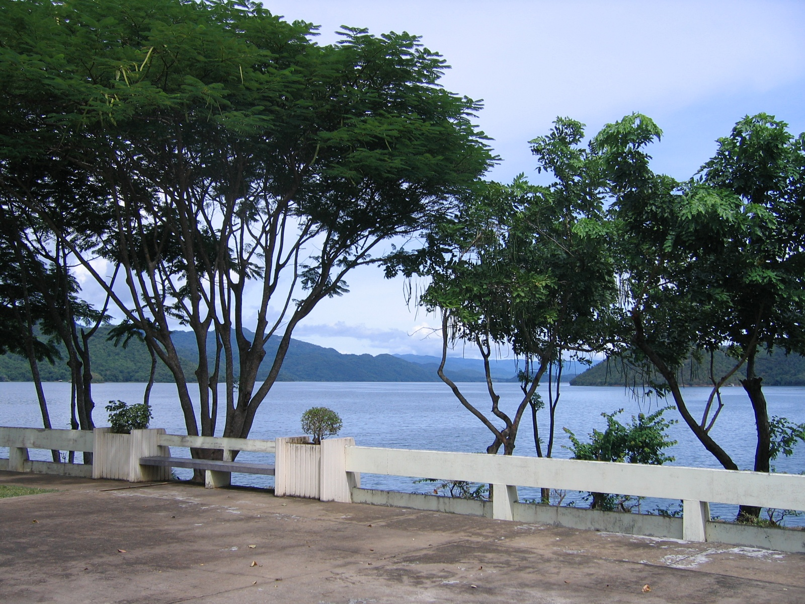 Lake behind Srinagarindra Dam, Amphoe Si Sawat, Kanchanaburi Province, Thailand